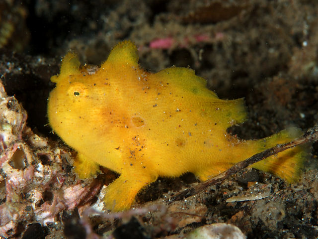 カエルアンコウ Antennarius striatus